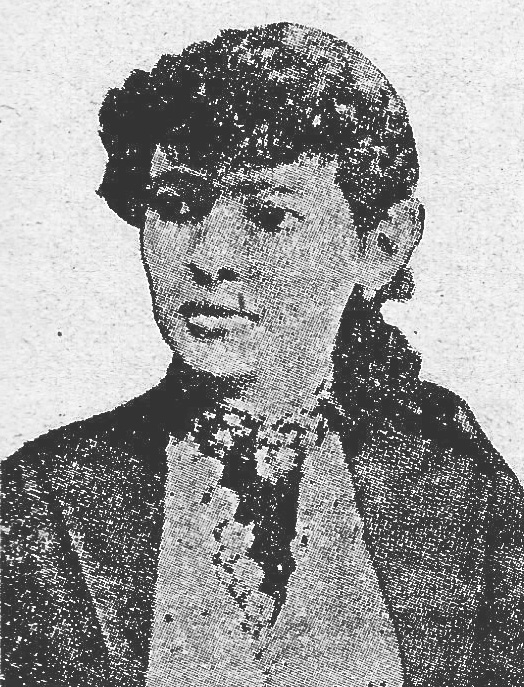 Fotografía de la Dra. Antonia Navarro, primera mujer Ingeniero de Centro América